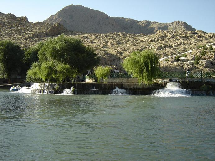 Una sorgente di Ravansar.